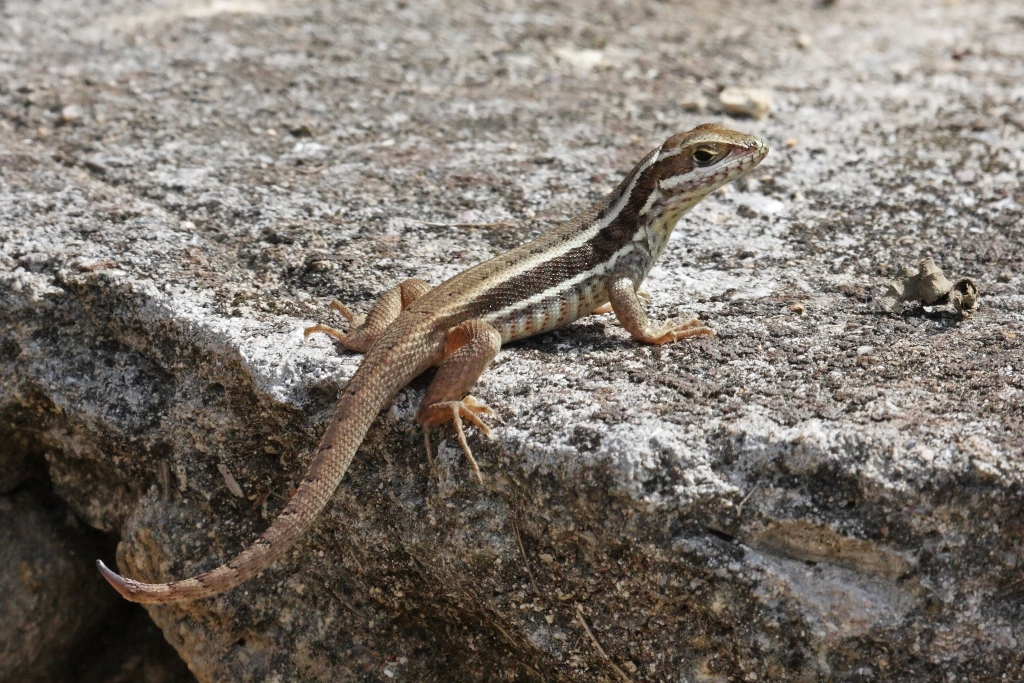 Playa Larga, Matanzas Province.